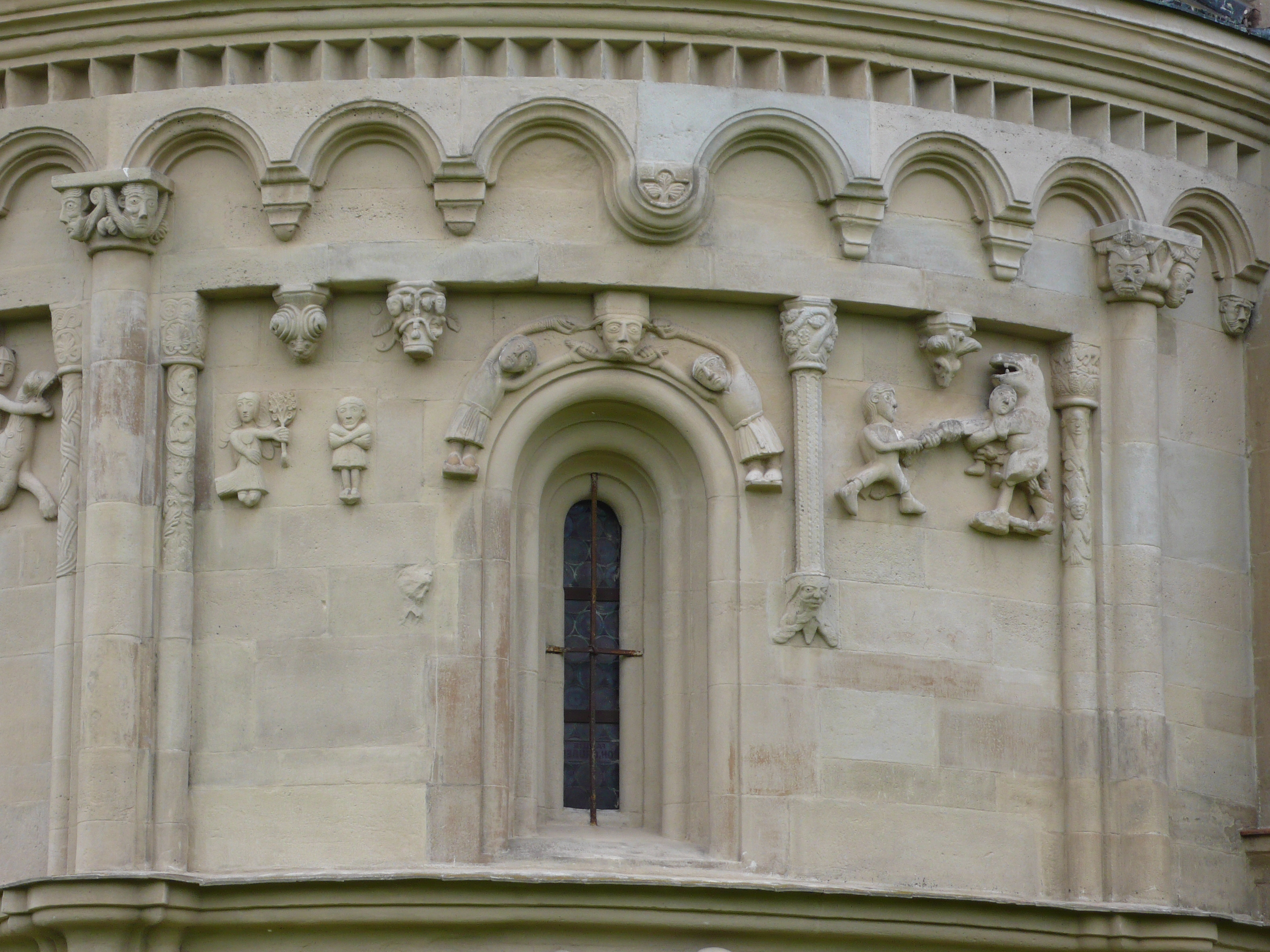 Schöngrabern, Niederösterreich, spätromanische Pfarrkirche, Apsis, Reliefdarstellungen